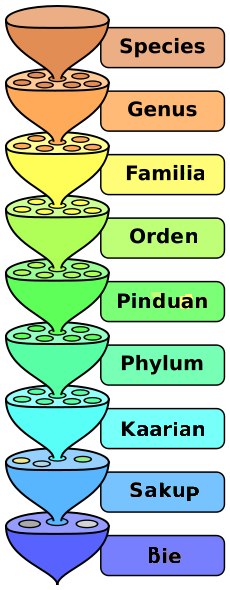 Kapampangan: Ing pamituki-tuki da reng walung pekamaulagang ranggung pang-taxonomia ning sistemang biolohikal. E la makabili deng mangalating ranggung atiu king pilatan da reti.